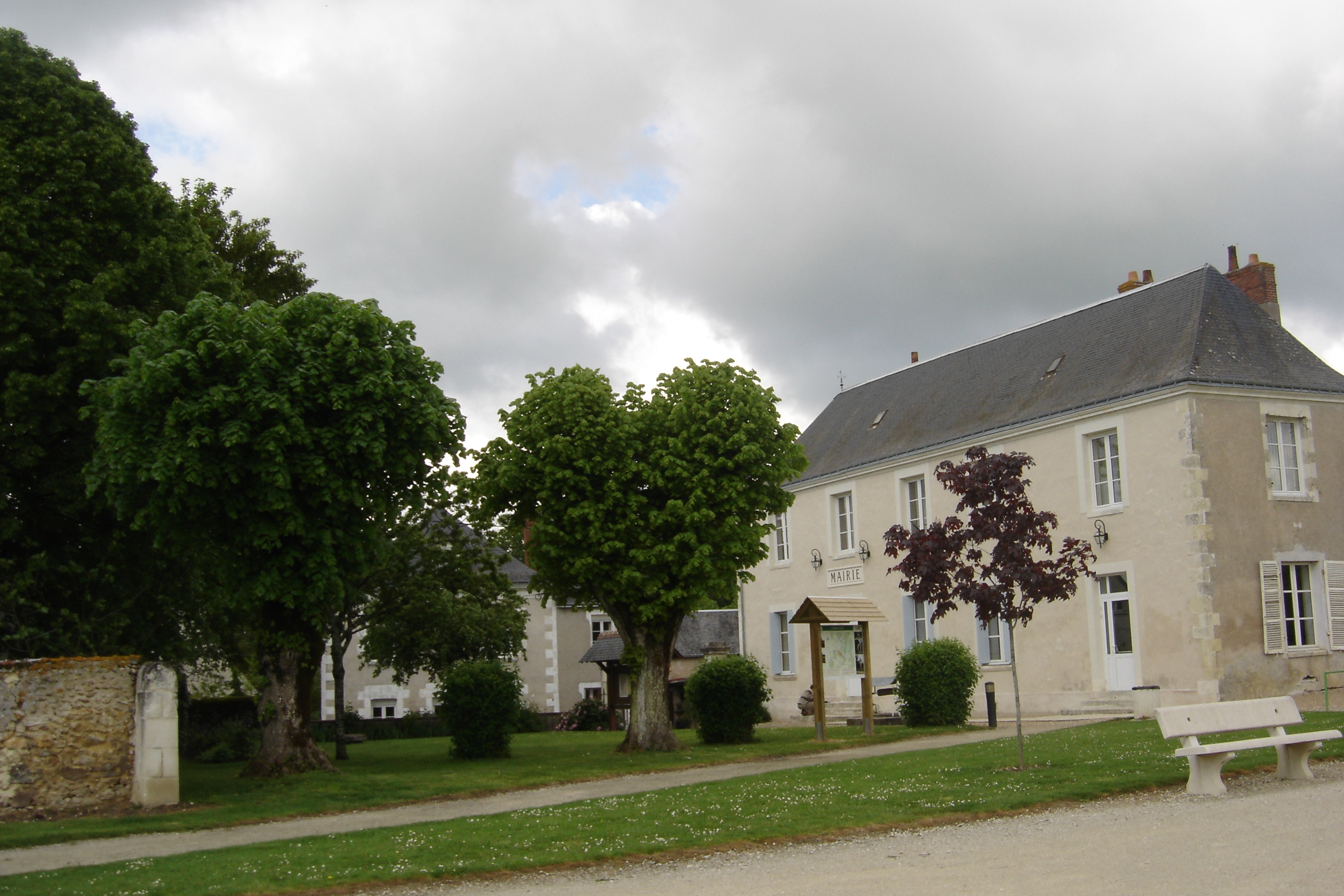 "La Grand' Maison", antérieure à 1641, rénovée et transformée en Mairie, bourg de Cerelles, Indre-et-Loire (37), France